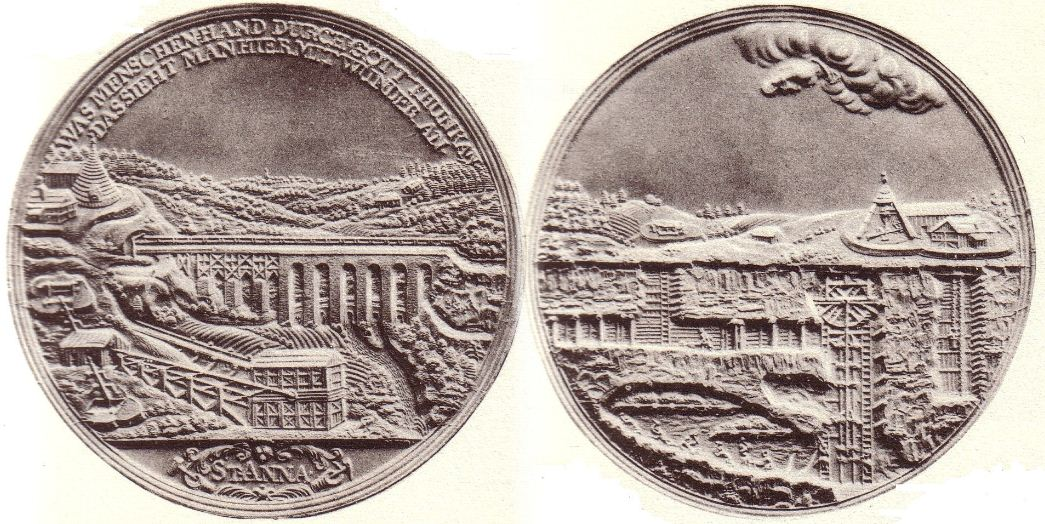 Medaille 1690 von Omeis, zur Ausbeutezahlung an die Gewerke der Fundgrube St. Anna